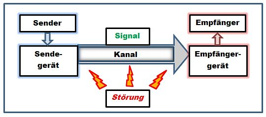 Sender-Empfänger Modell nach Shannon und Weaver mit sieben Kommunikationselementen